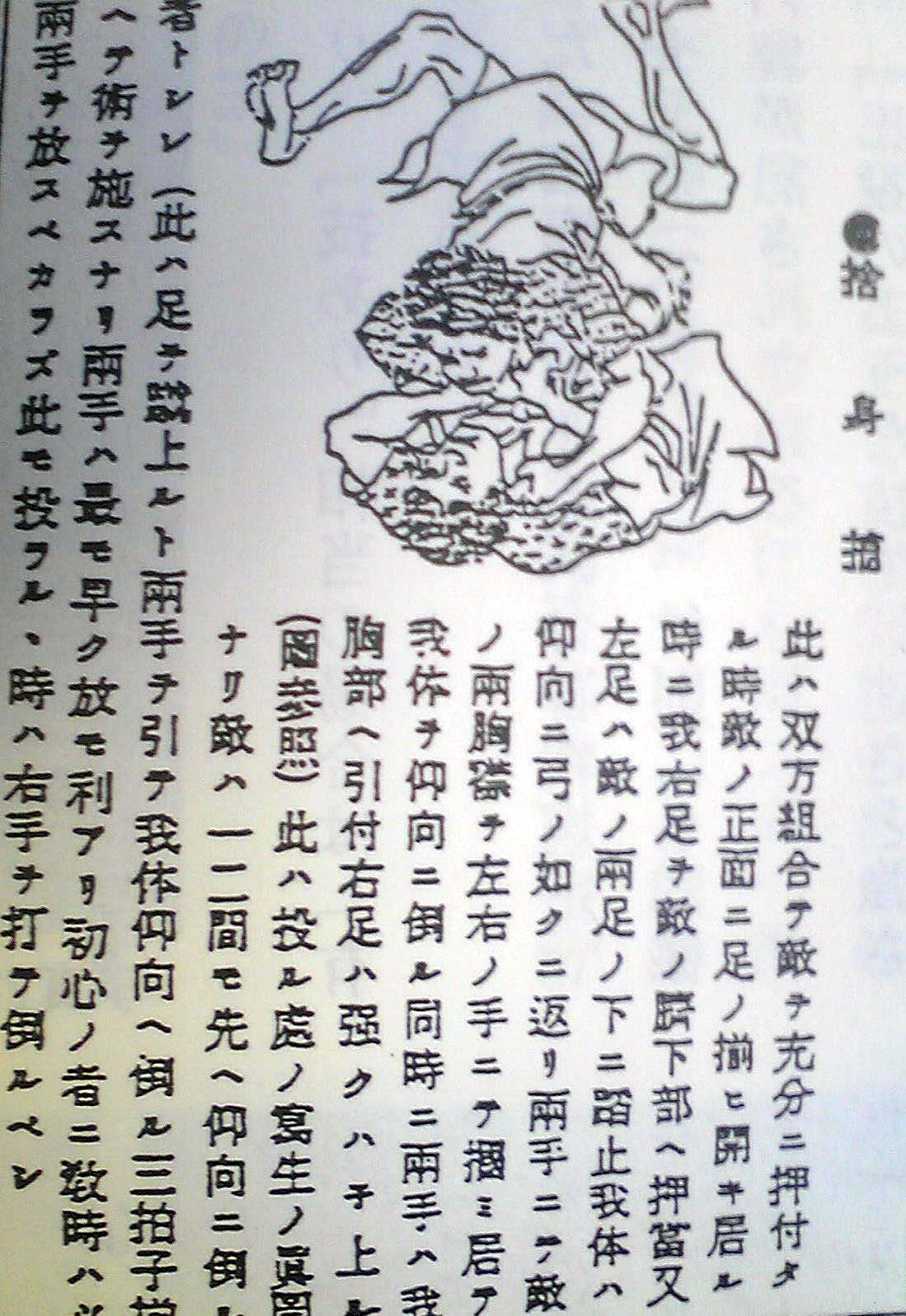 Tomoenage